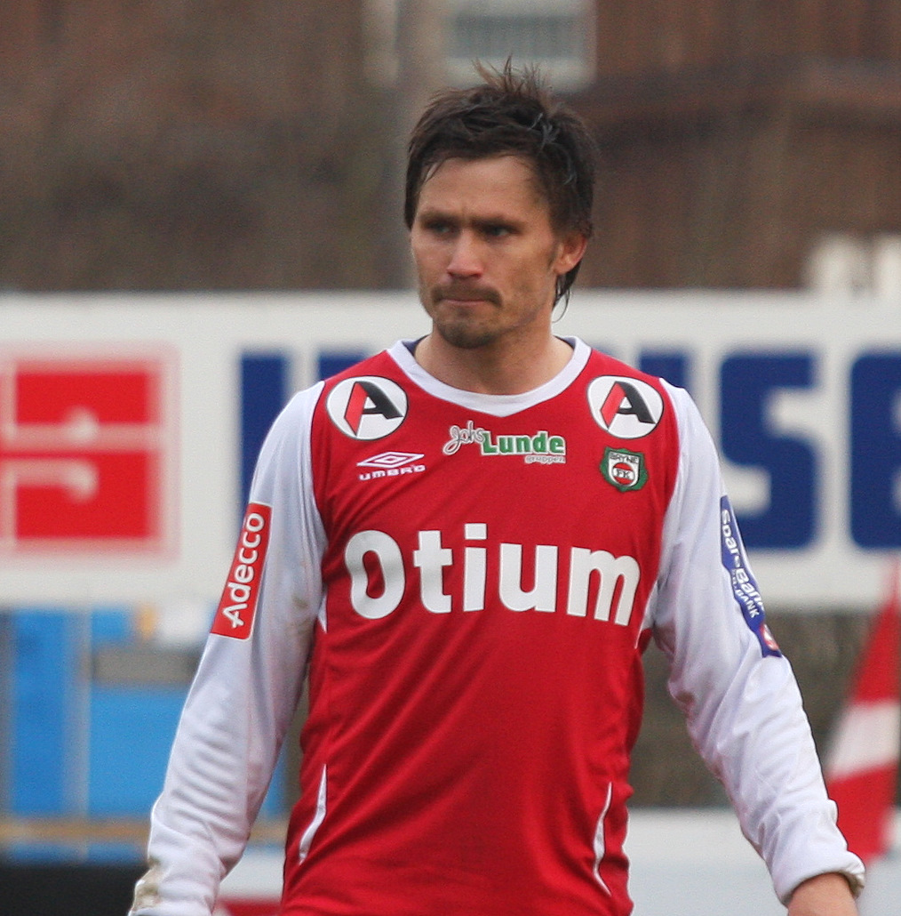 Allan Borgvardt, Bryne FK